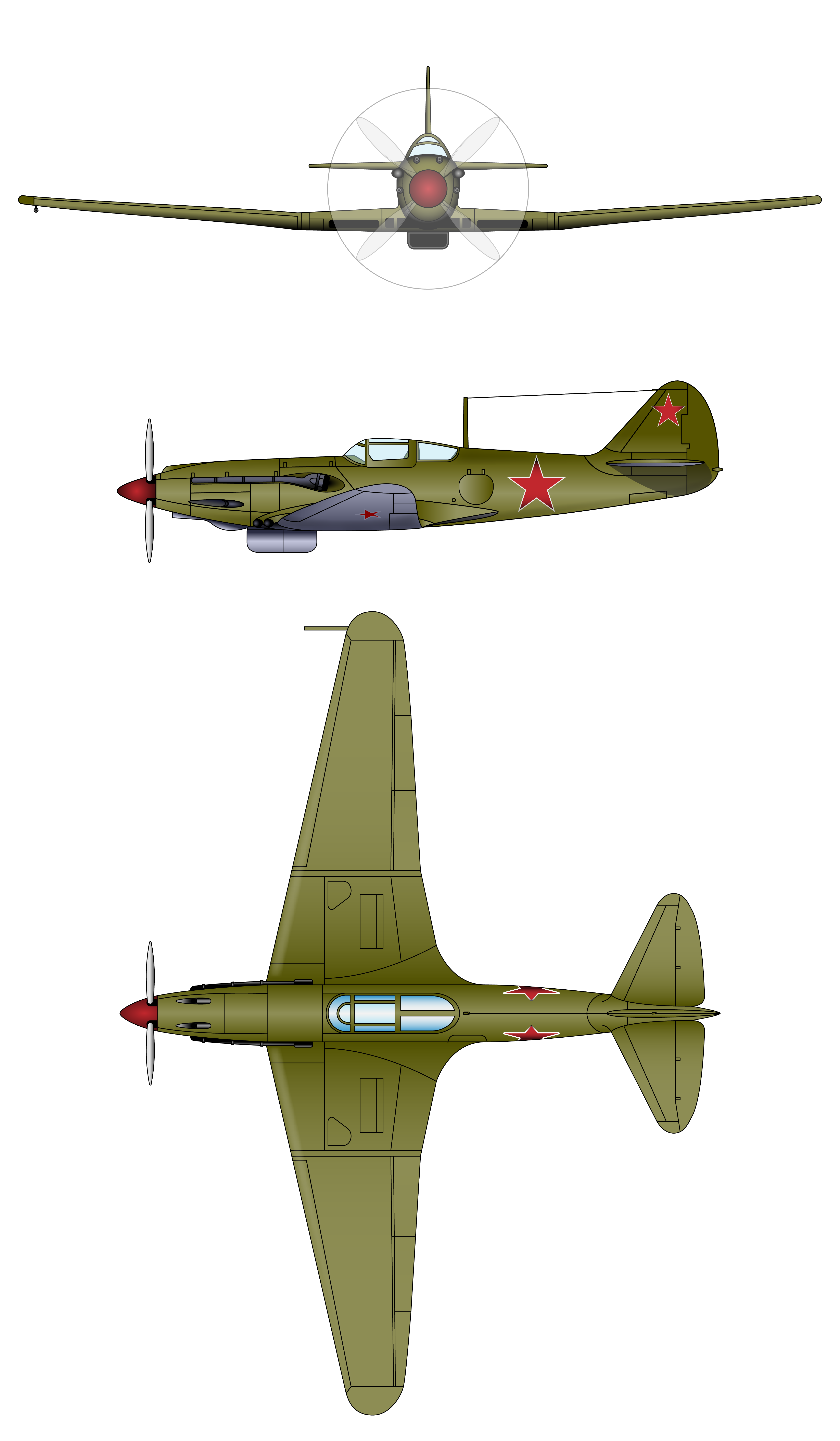 Mikojan-Gurevich I-222